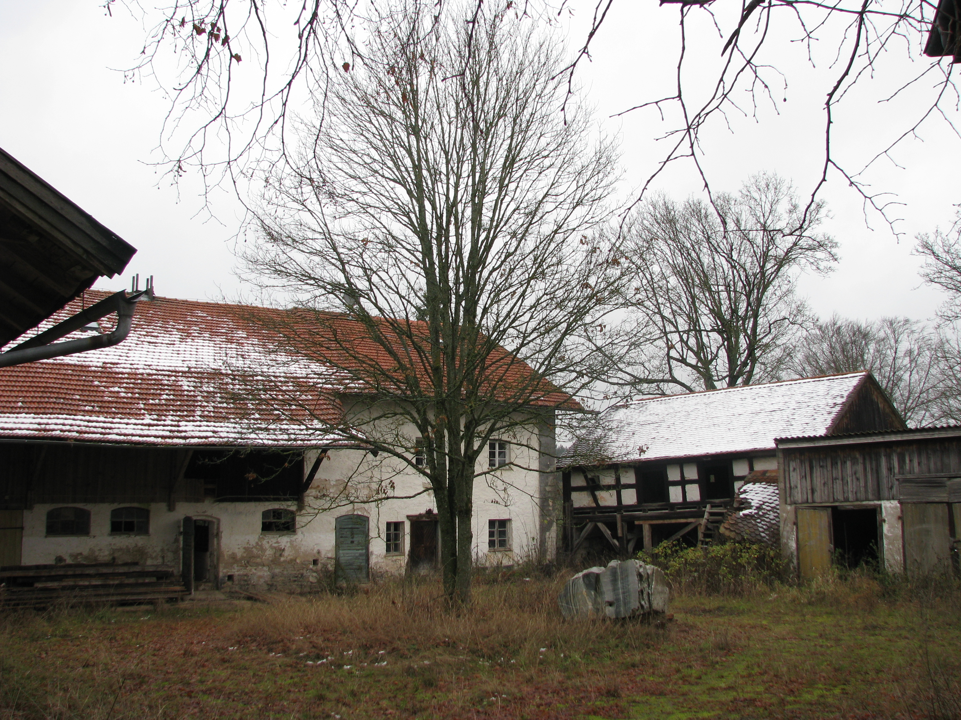 Bleimerschloß bei Kraftsbuch, Ortsteil von Greding im mittelfränkischen Landkreis Roth in Bayern, ehemaliges Gutshaus, Ökonomiegebäude